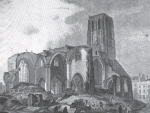 Afbraak van de Sint-Gorikskerk in 1799. Ill. anoniem. Stedelijk museum Brussel